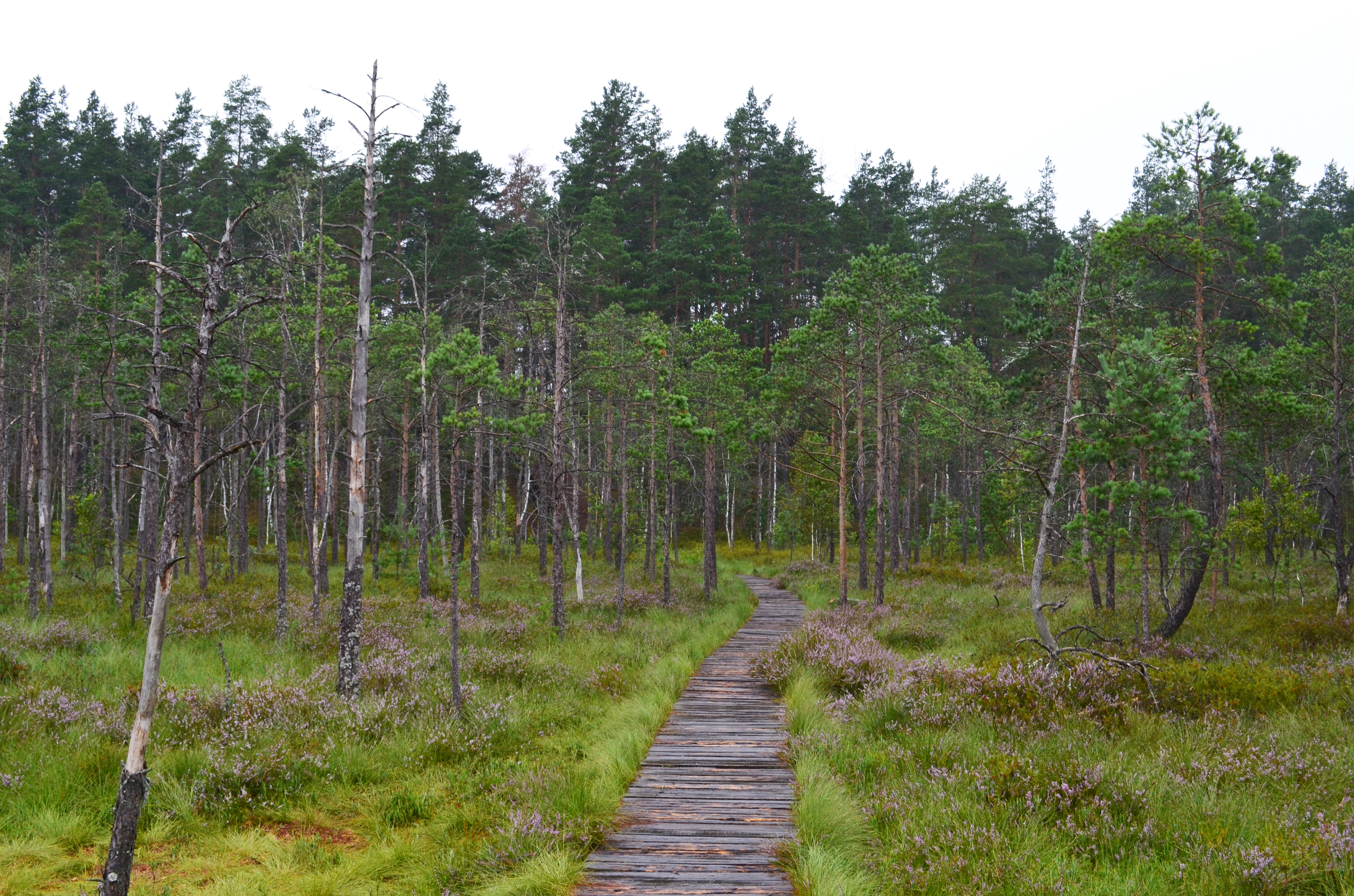 Pušų retmiškis, Čepkeliai, Varėnos r.